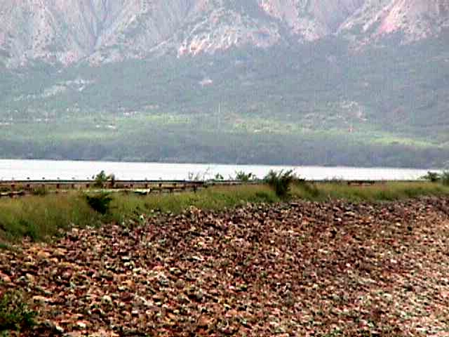 Embalse de Los Cerritos cerca de El Tocuyo, estado Lara - Venezuela (1999)